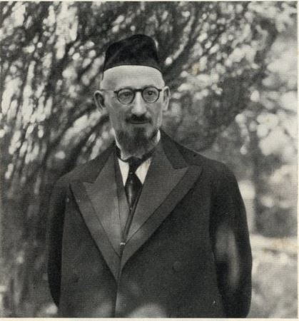 Rav Botschko Yerahmiel Eliyahu, 1888-1956.